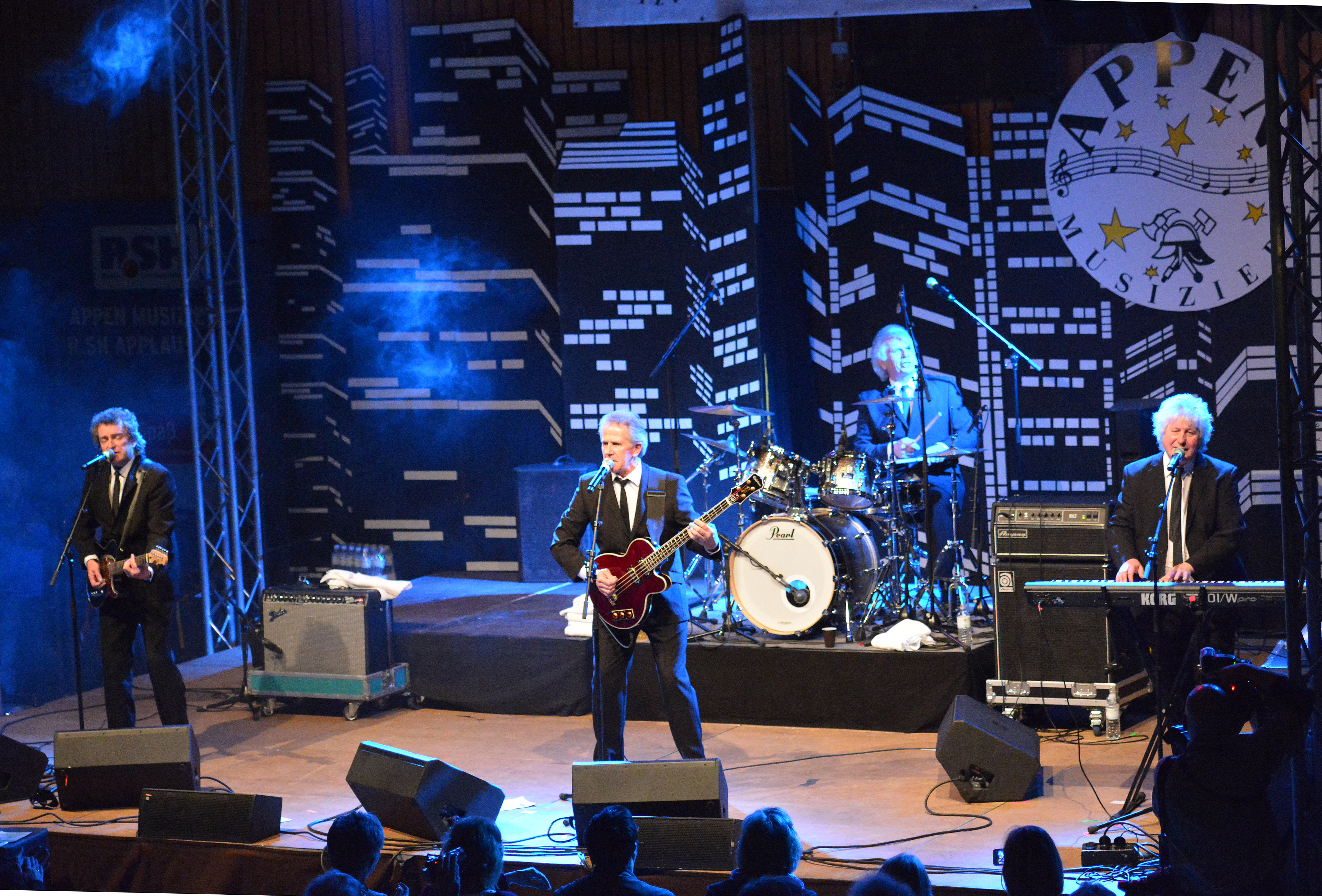 Herman’s Hermits während der „50th Anniversary Tour“ bei Appen musiziert 2014